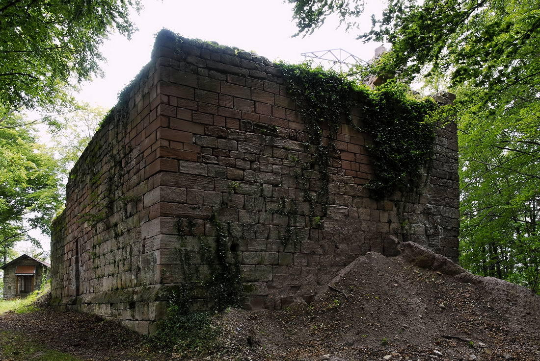 Ruine du château de Bruyères (88).